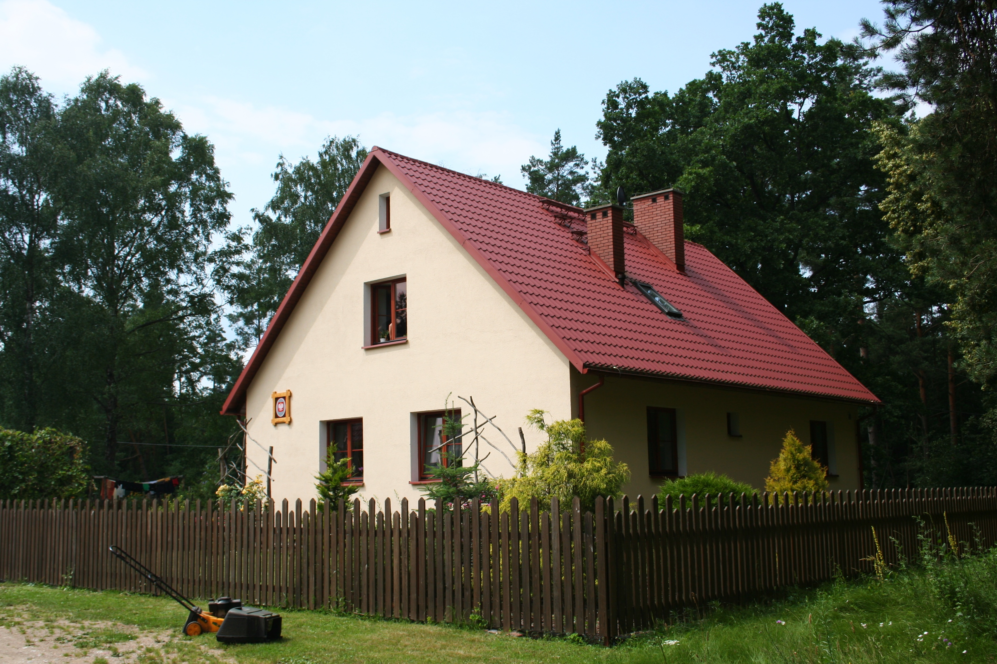 leśniczówka Tobołowo, woj. podlaskie